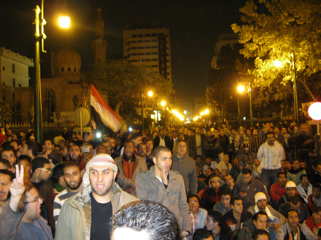 anger protest